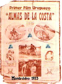 Afiche de la película "Almas de la Costa", Uruguay 1923